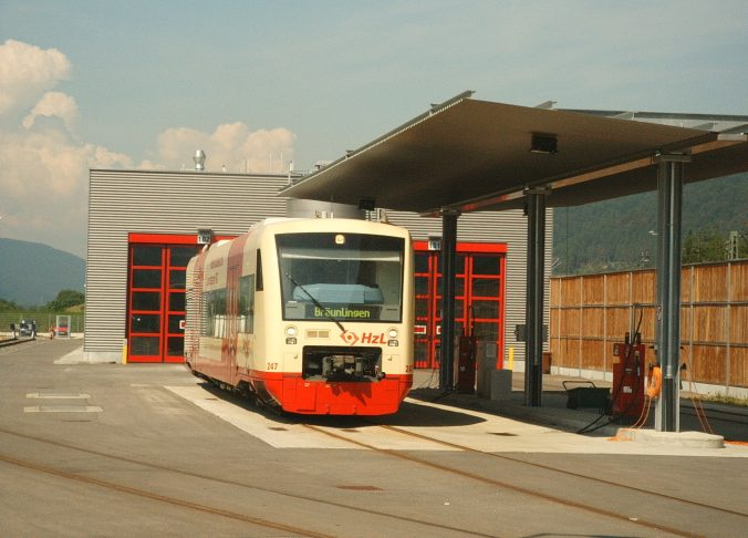 Regio-Shuttle des Ringzugs beim Bahnbetriebswerk Immendingen